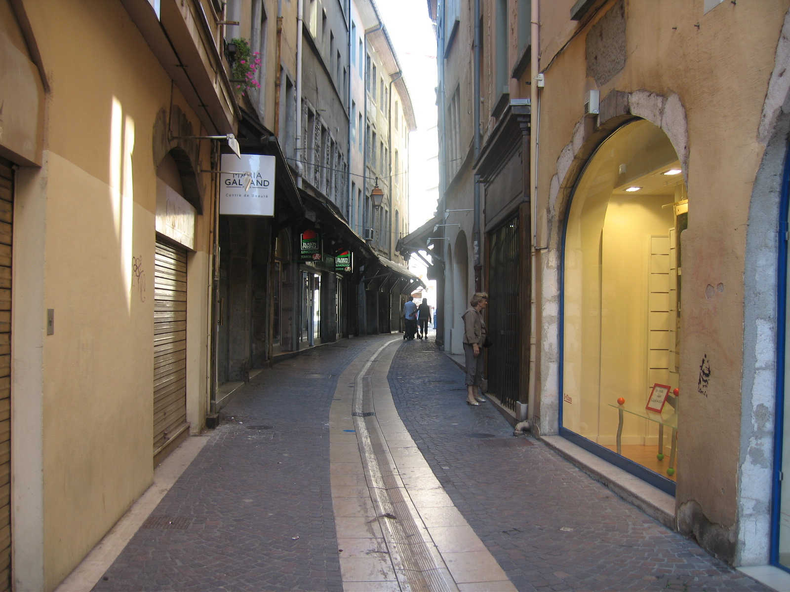 Rue du Sénat de Savoie, típica callejuela peatonal en el barrio histórico de Chambéry, en Francia.